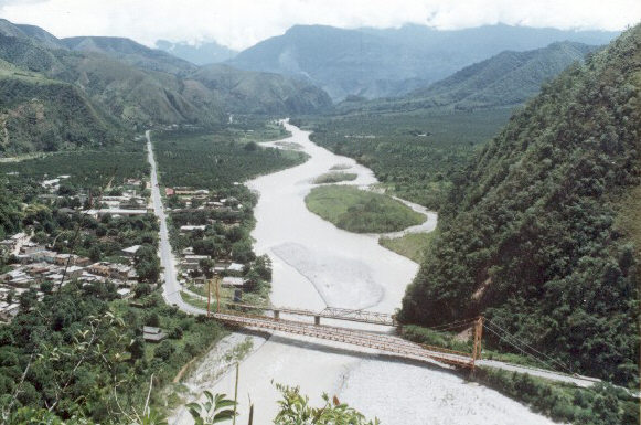 Puente Herreria San Ramon